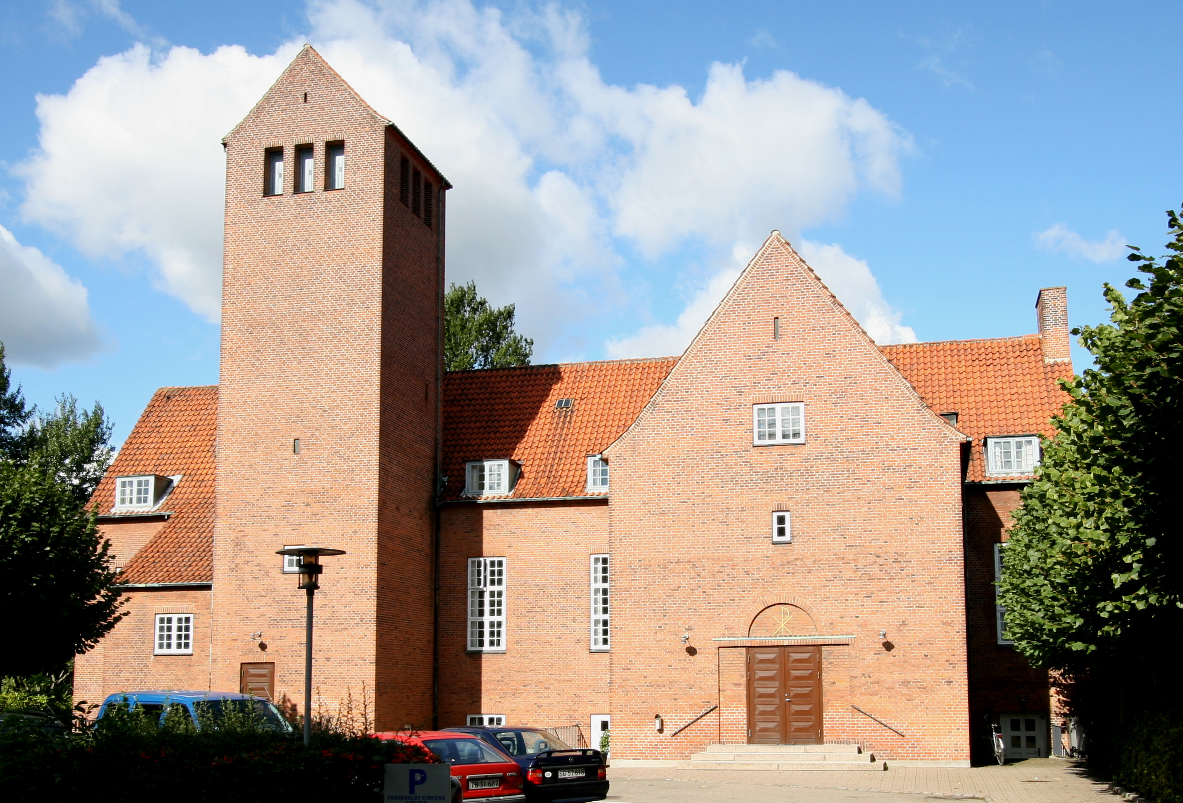 Frederiksholm Kirke in Copenhagen, Denmark. Exterior.